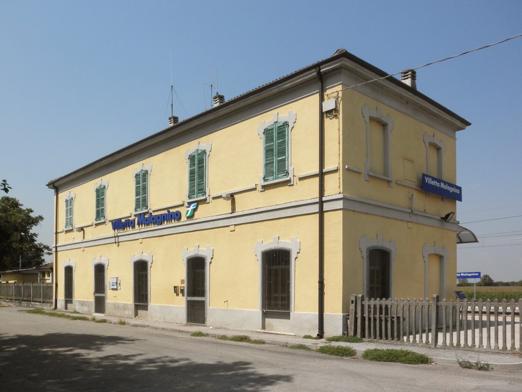 Stazione ferroviaria di Villetta Malagnino